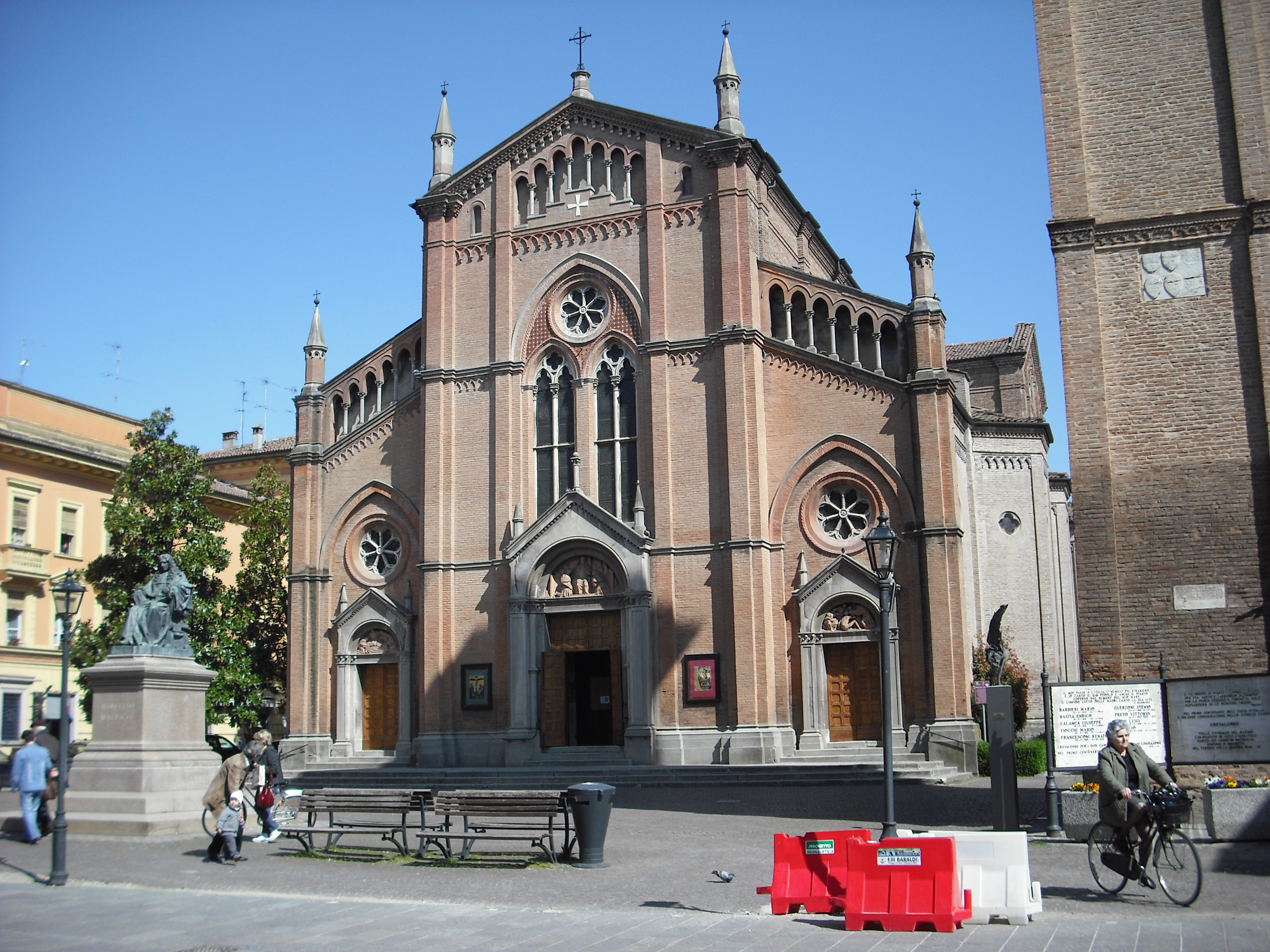 La Chiesa di San Silvestro presso Crevalcore.